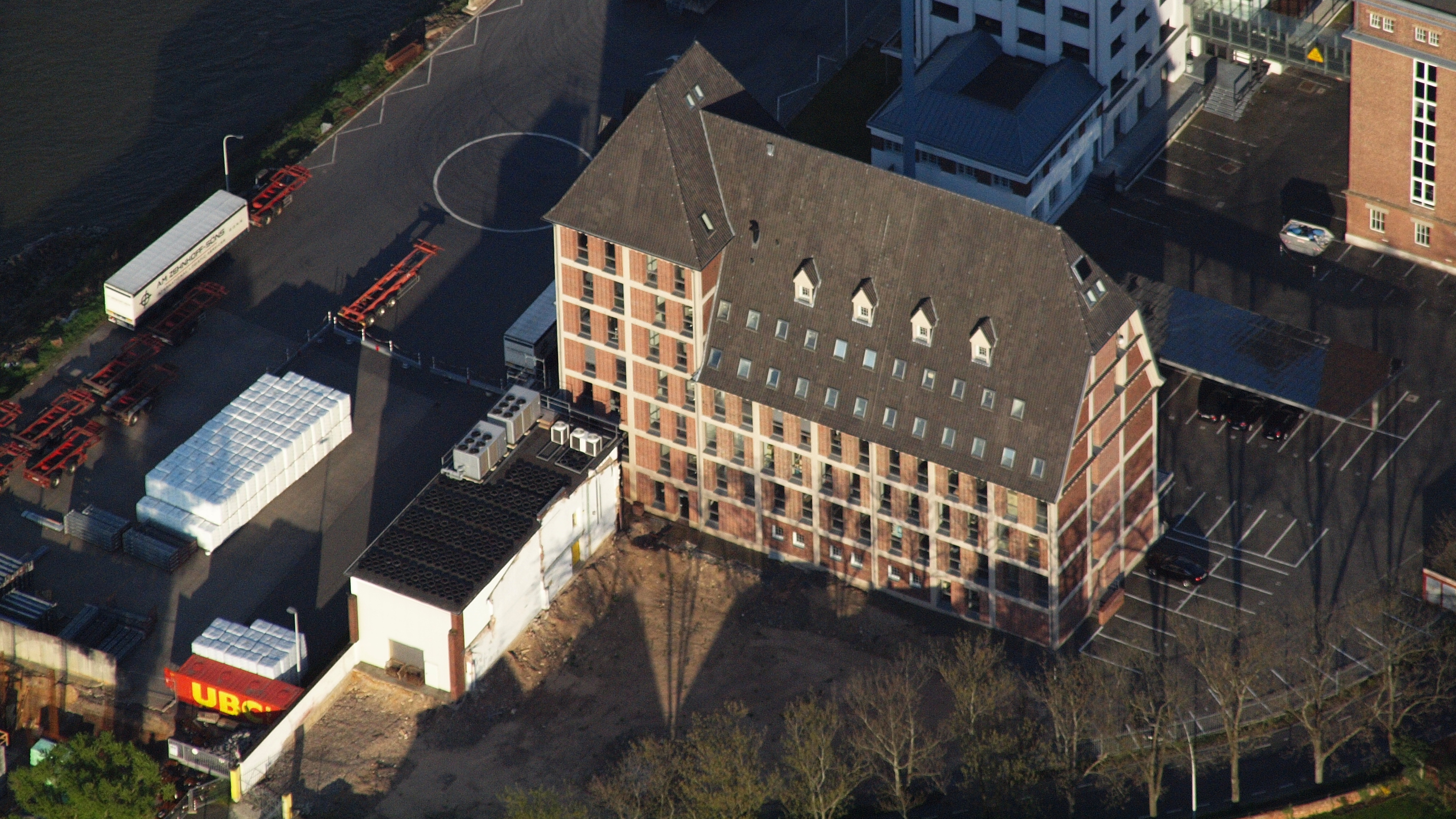 ehemalige Auermühle in Bonn-Graurheindorf; Schrägluftbild, Detailansicht Silo II